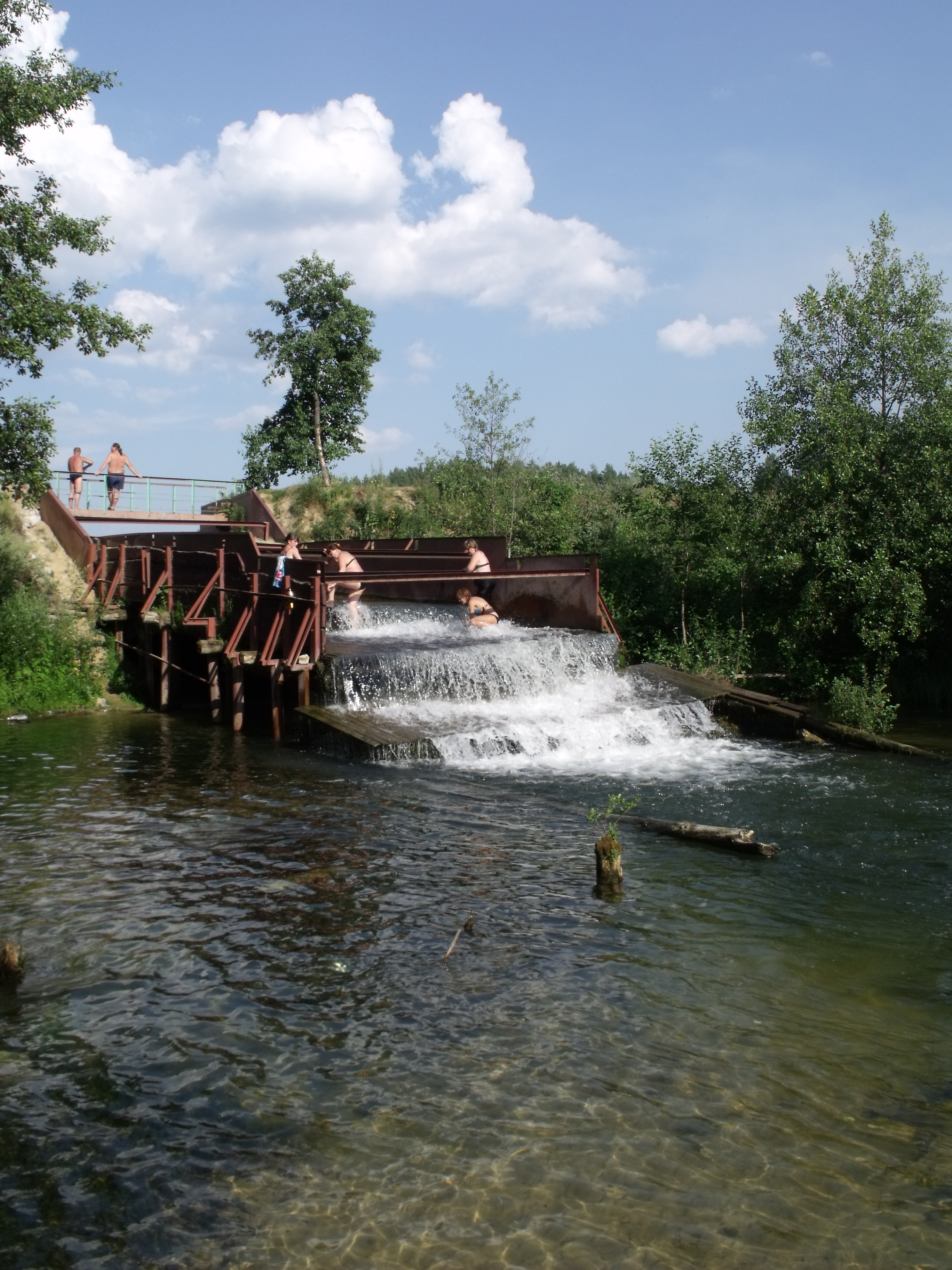 Юловский пруд: Кв. NN 59, 78, 79 Глотовского лесничества Инзенского лесхоза, Инзенский район, Ульяновская область This image is related to the protected area of Russia number 7310041